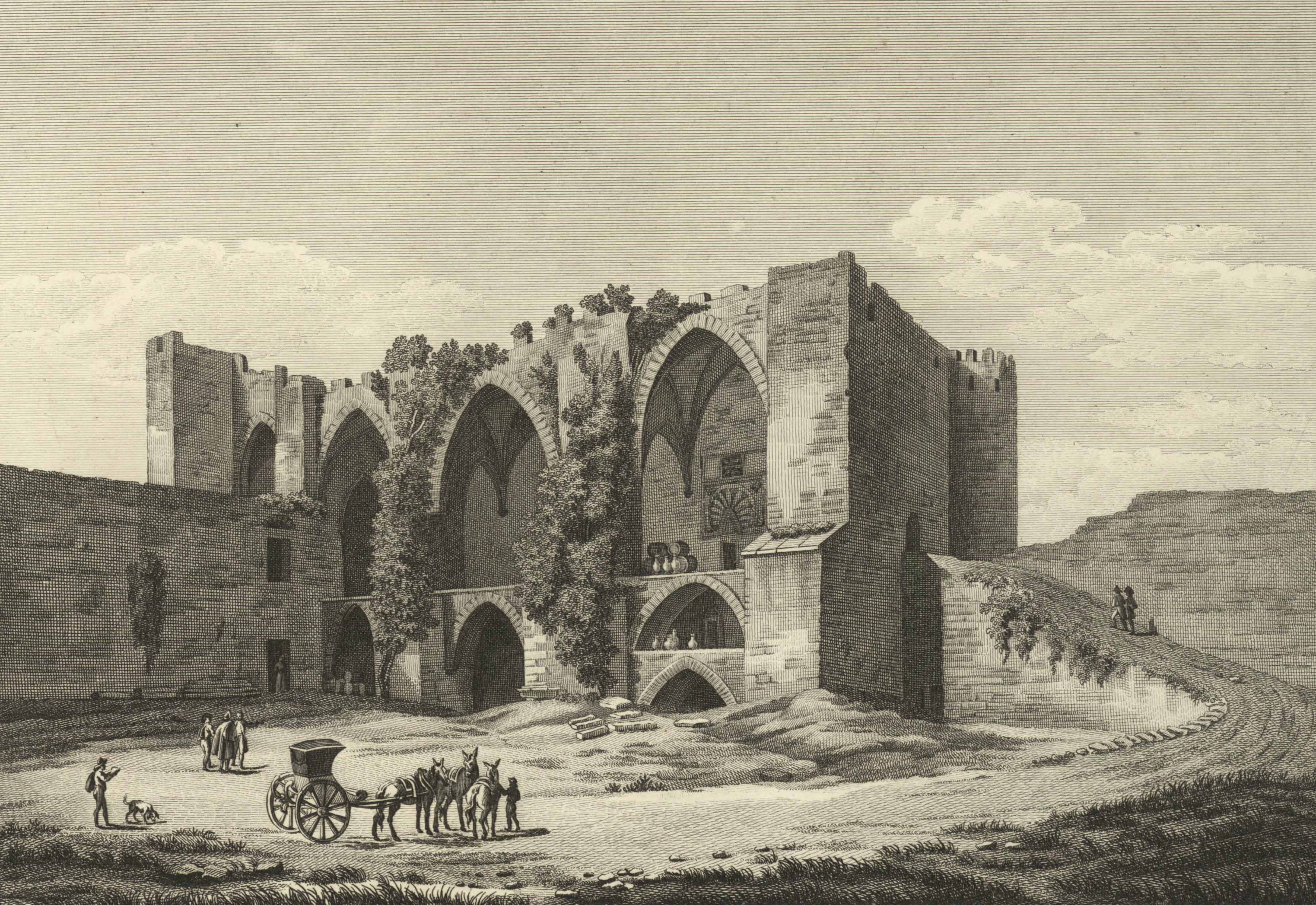 Ruinas del palacio de Alfonso el Sabio.